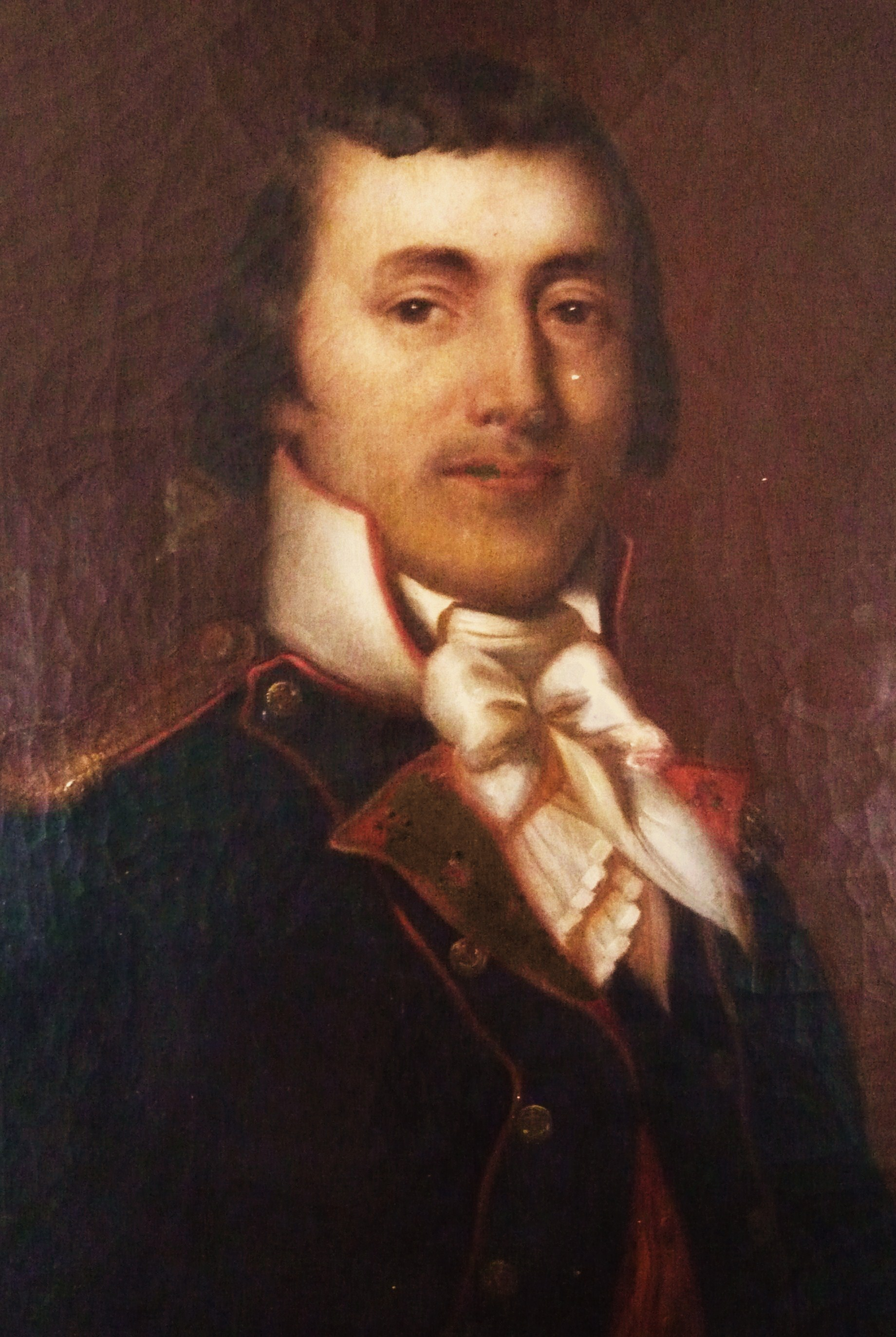 Général français de la Révolution et d'Empire (1757-1811)